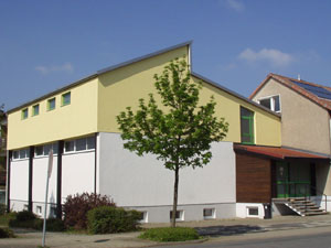 Aussenansicht Dojo des Judo-Karate-club Sportschule Goslar e.V.